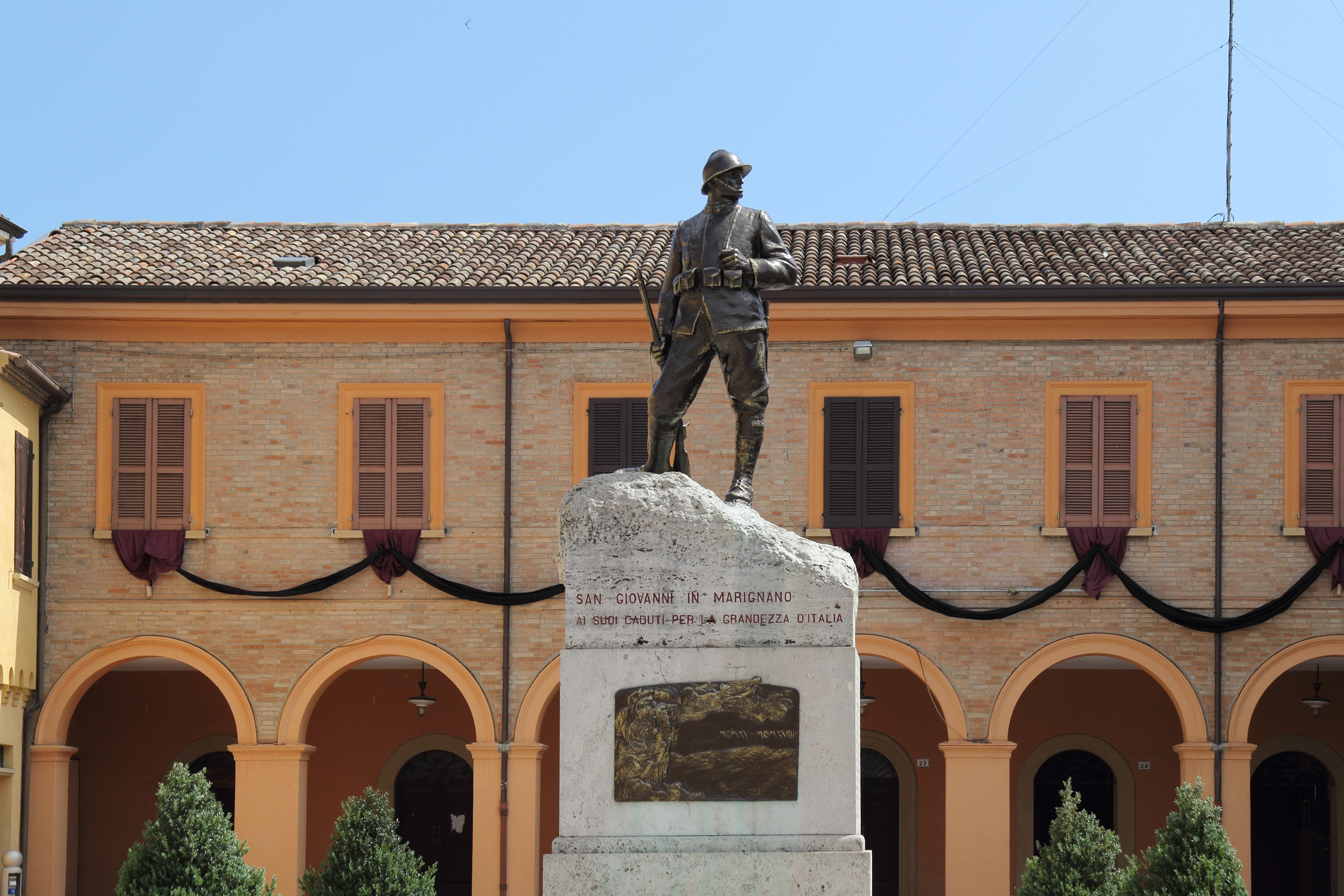 San Giovanni in Marignano Gefallenendenkmal